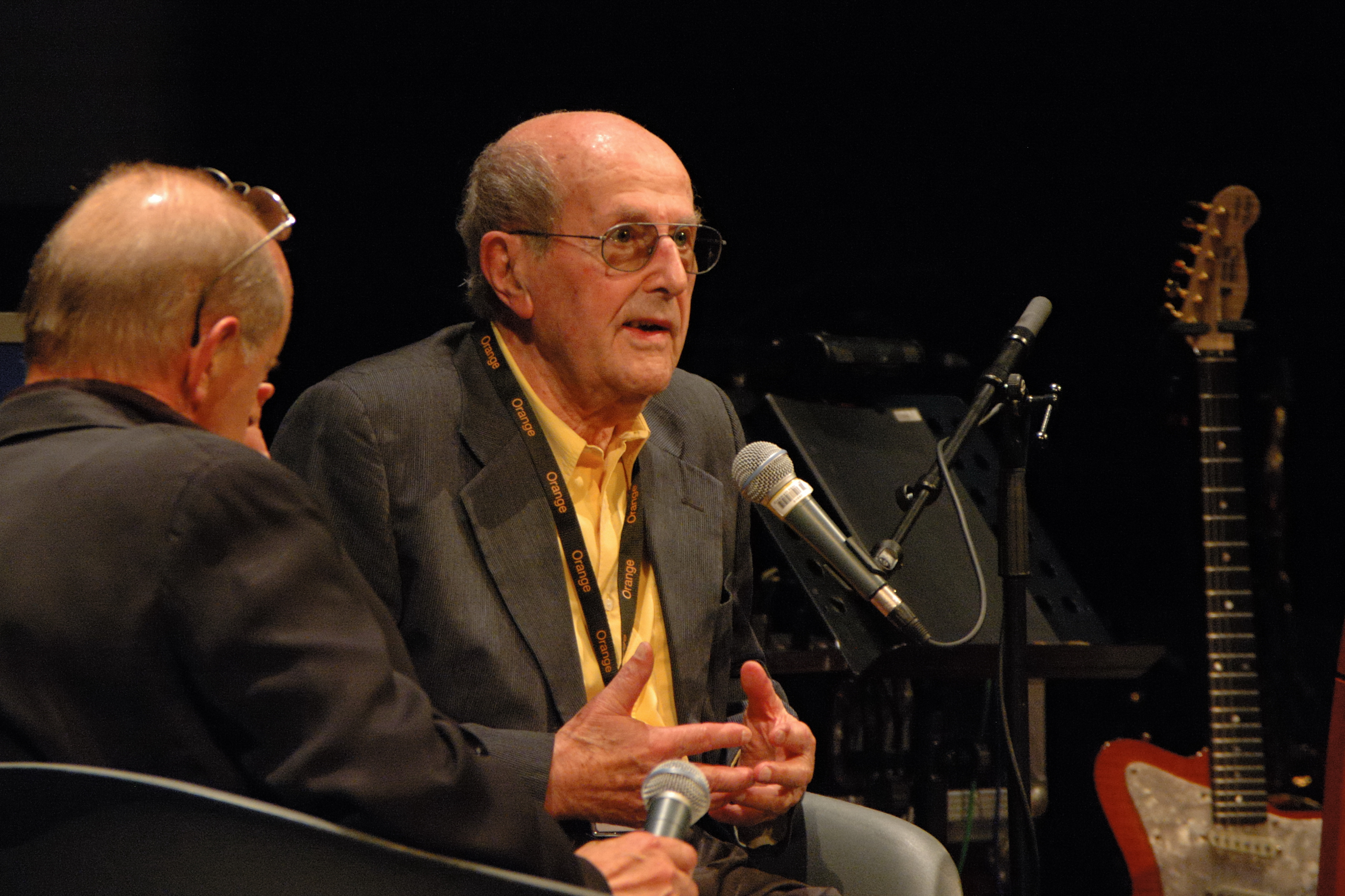 Manuel de Oliveira répondant à Antonio Tabucchi à la cinémathèque française